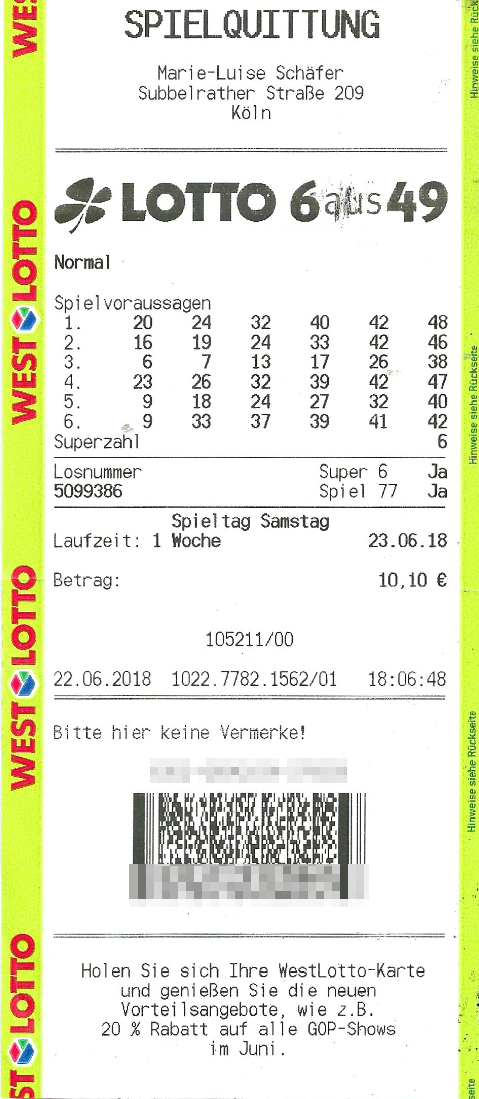 Lottoschein Westlotto 2018